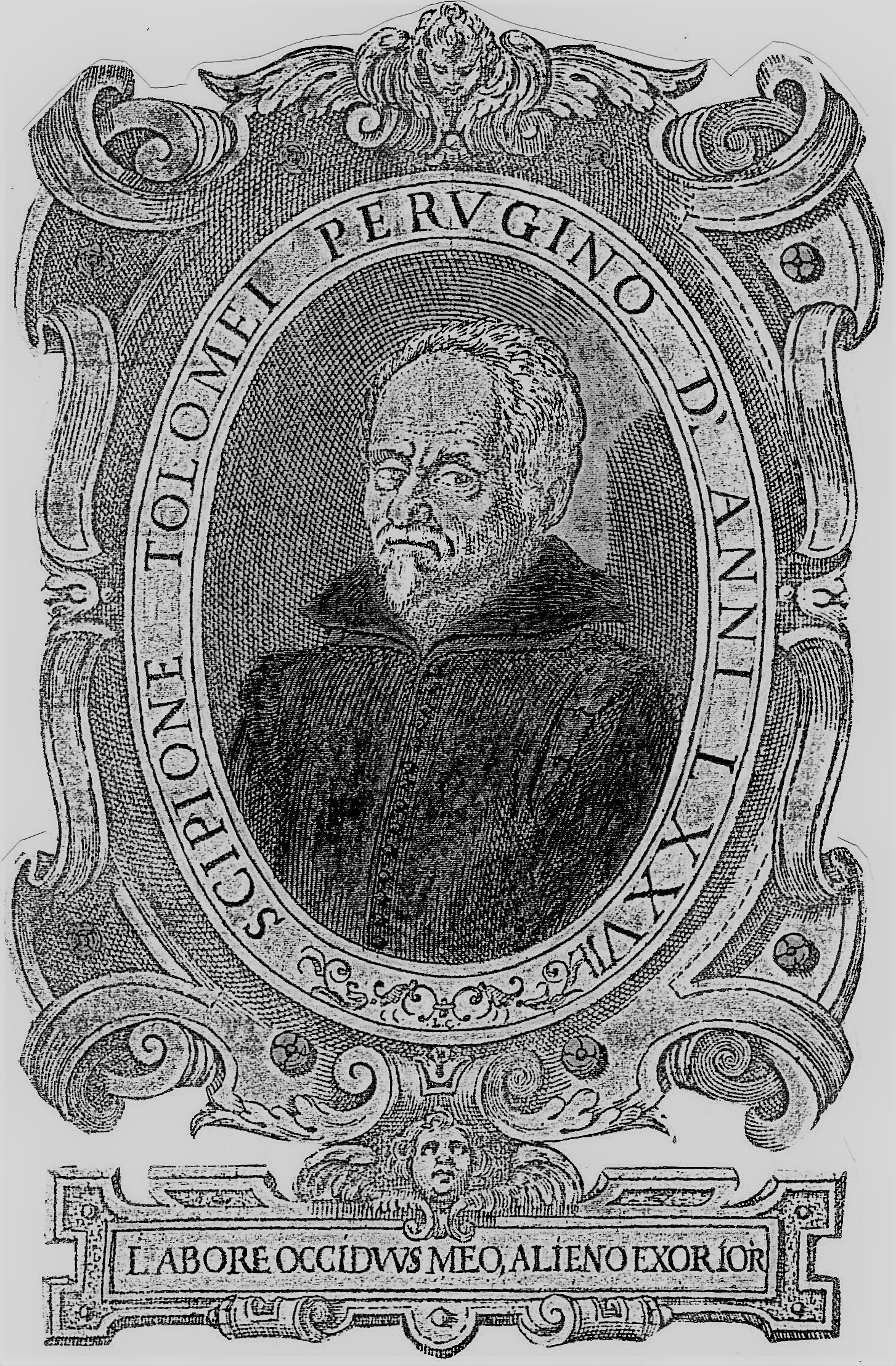 sembianze di Scipione Tolomei, scrittore politico antimachiavelli di Perugia: 1553-1630